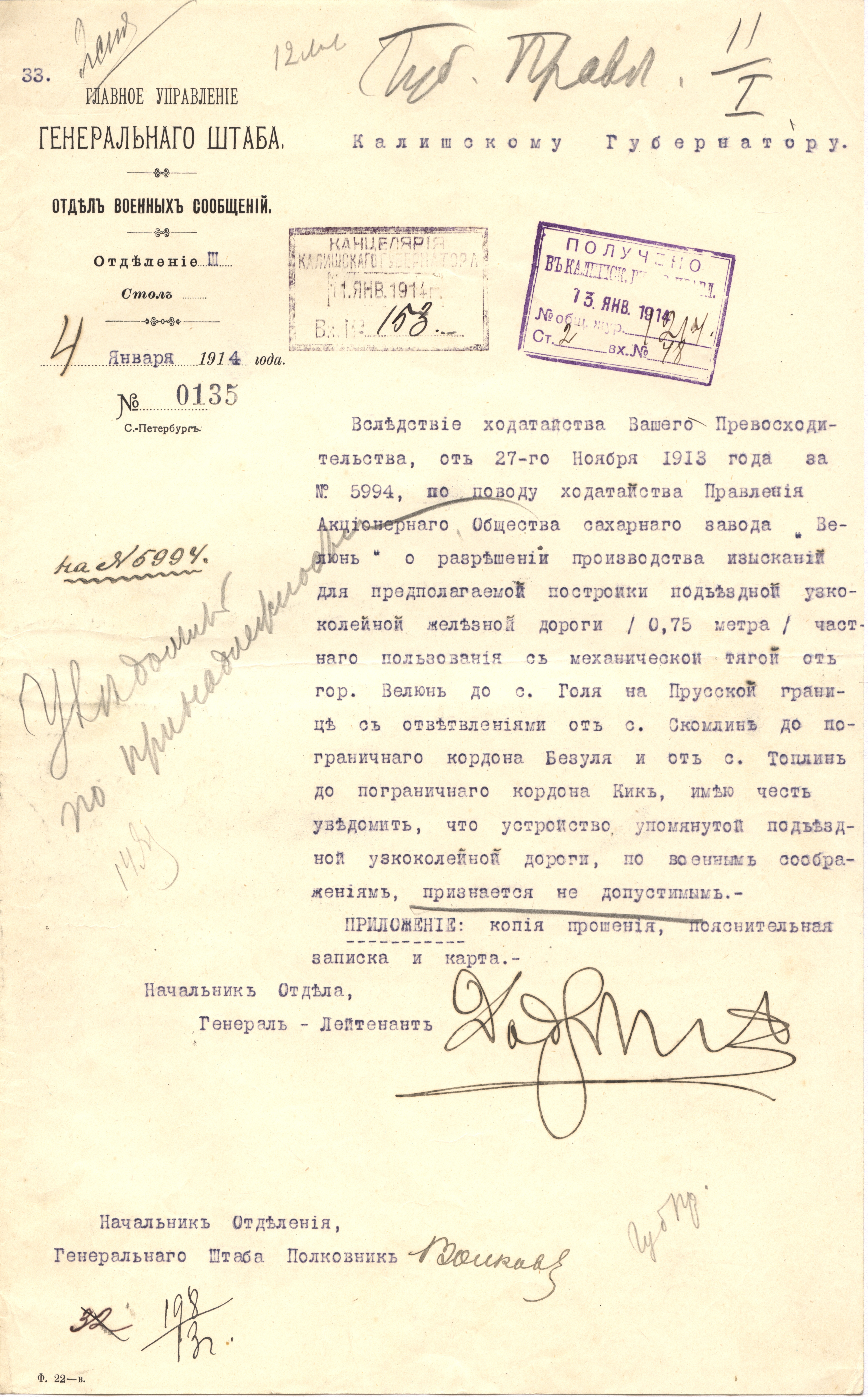 Pismo głównego zarządu rosyjskiego sztabu generalnego do gubernatora kaliskiego nie zezwalające ze względów strategicznych na budowę kolei wąskotorowej od cukrowni Wieluń do wsi Gola i Skomlin przy granicy pruskiej. [Piotr Strembski]